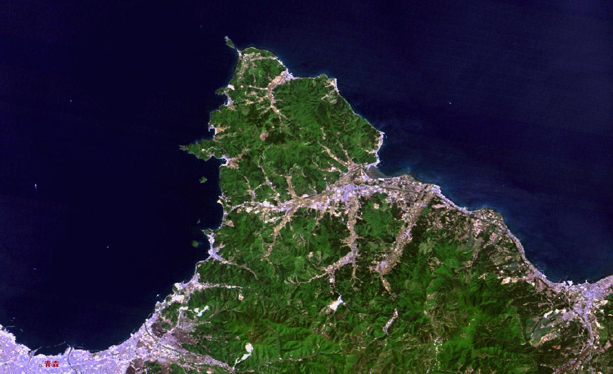 Natsudomari Peninsula in Aomori, Japan